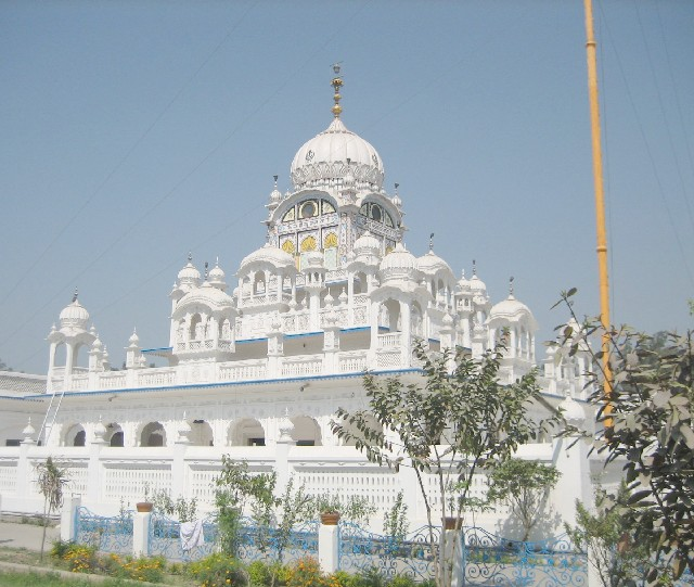 Gurudwara Shree Antaryamta